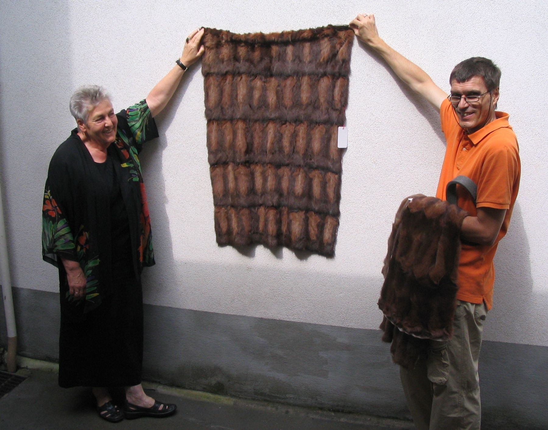 Felltafel aus rusapi gefärbter Fehwamme. Links Kürschnermeisterin Frauke Kuhn, Düsseldorf, rechts Kürschnermeiser Andreas Schad. Aufgenommen in Firma CHR. SCHAD PELZ UND LEDER, Ludwigshafen.